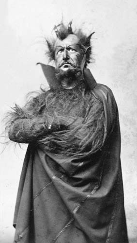 Charles Gounod: Faust. Magyar Állami Operaház. Kornay Richárd (1870–1931) magyar operaénekes Mephisto szerepében